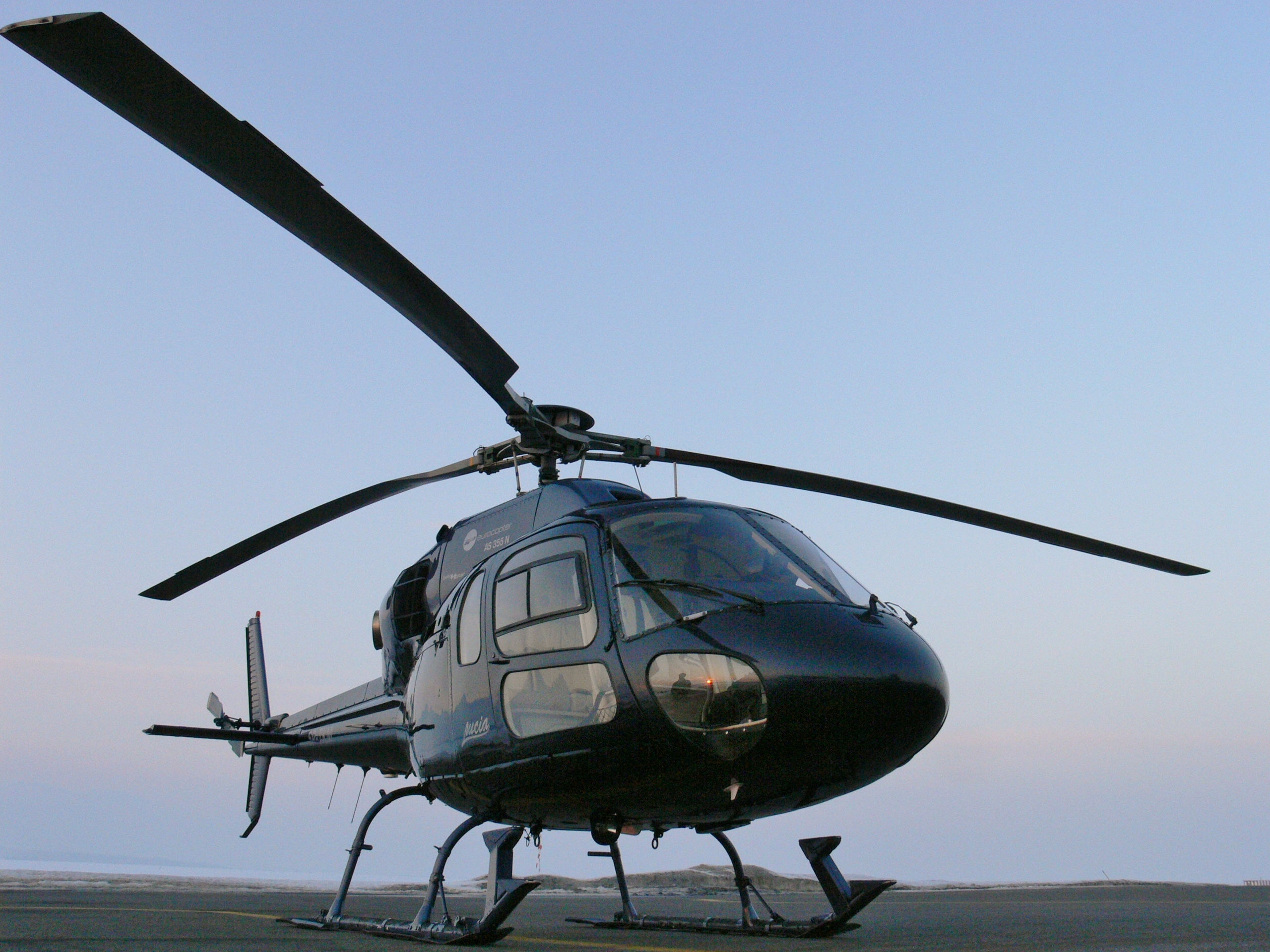 Ecureuil AS 355N OM-ATH popradskej spoločnosti Air Transport Europe , Slovakia